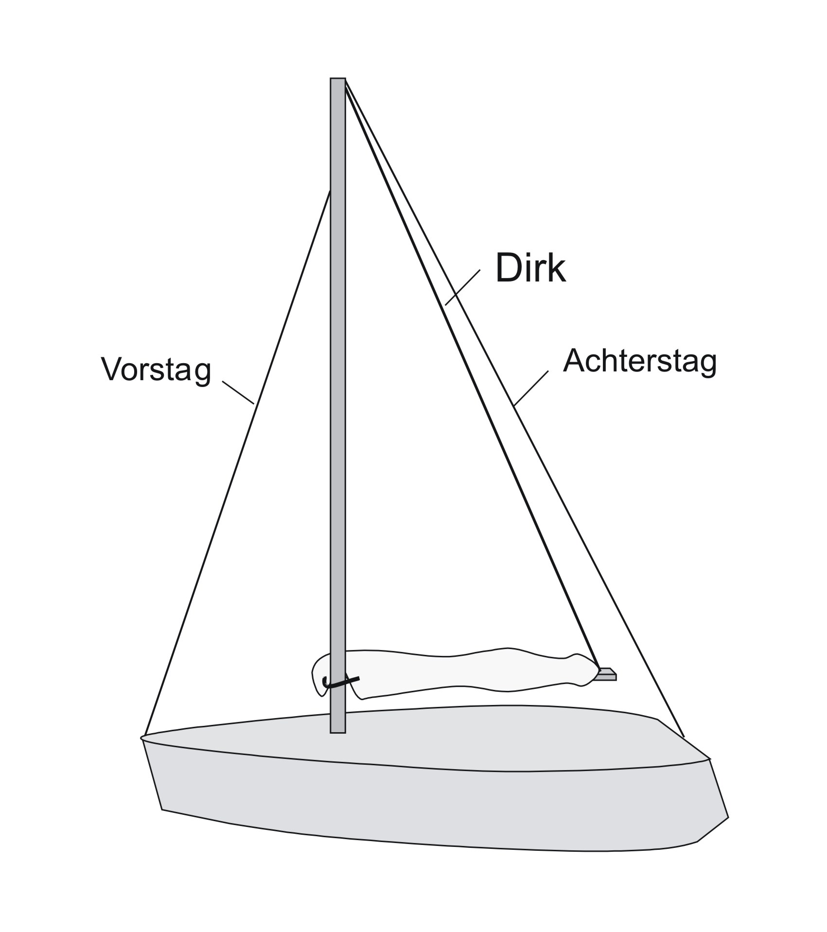 Dirk eines Segelschiffes